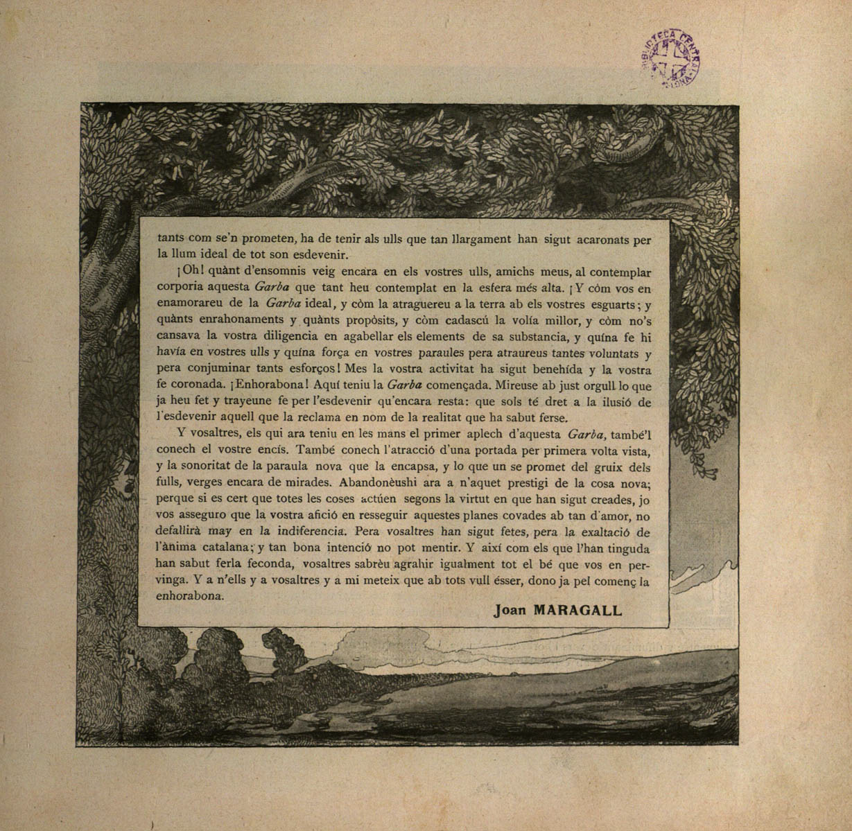 Garba (revista)